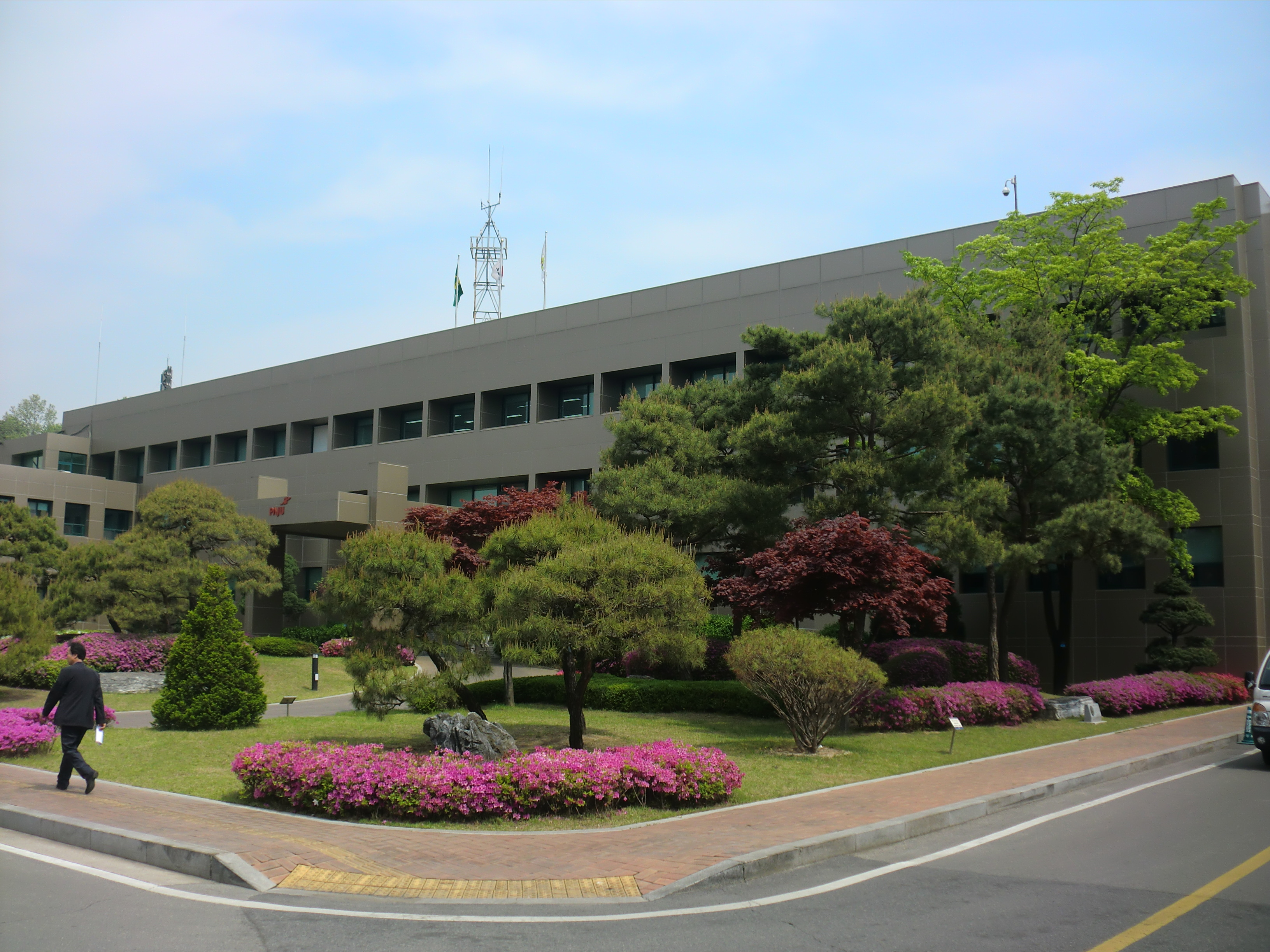 경기도 파주시에 있는 파주시청